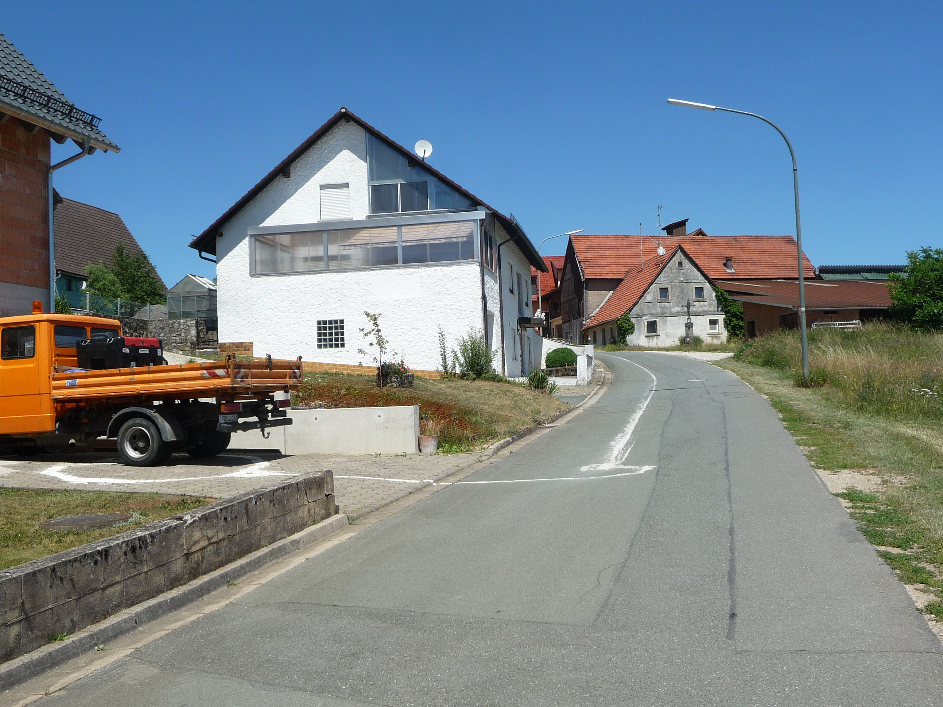 Freunde/Verwandte reisen von der Wohn-/Elternanschrift der Braut zur Wohn-/Elternanschrift des Mannes, wobei eine Spur gelegt wird, die diese beiden Orte miteinander verbindet. Der Weg führt vorbei an (fast) allen Anschriften der unverheirateten, ehemaligen Partner(-innen) von Braut und Bräutigam.